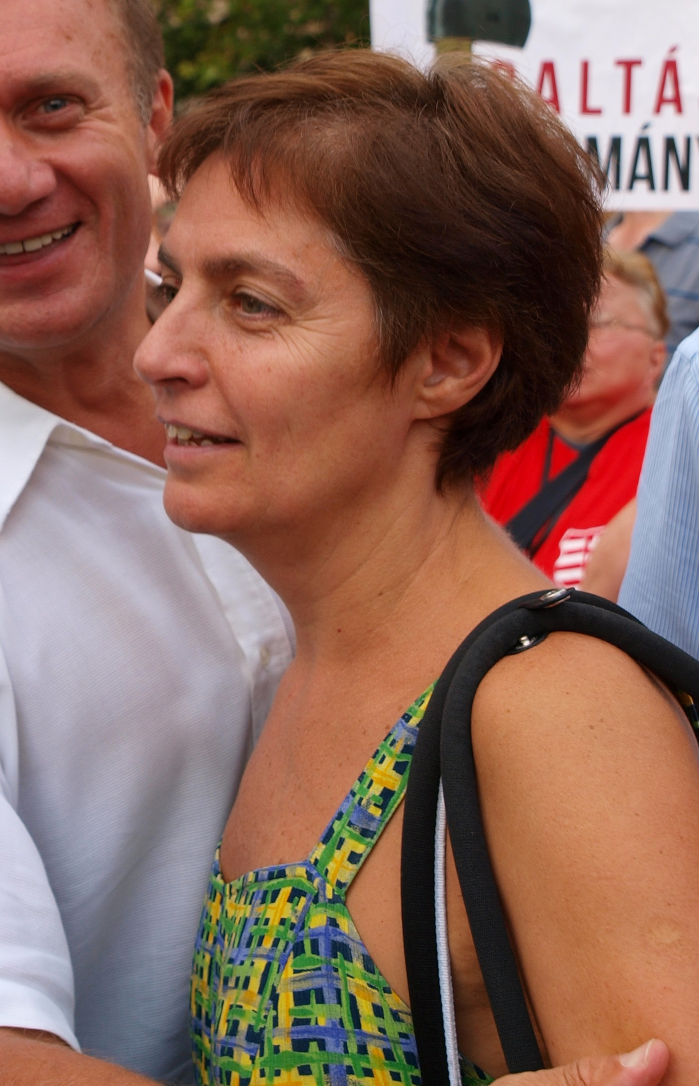 Havas Szófia (MSZP)